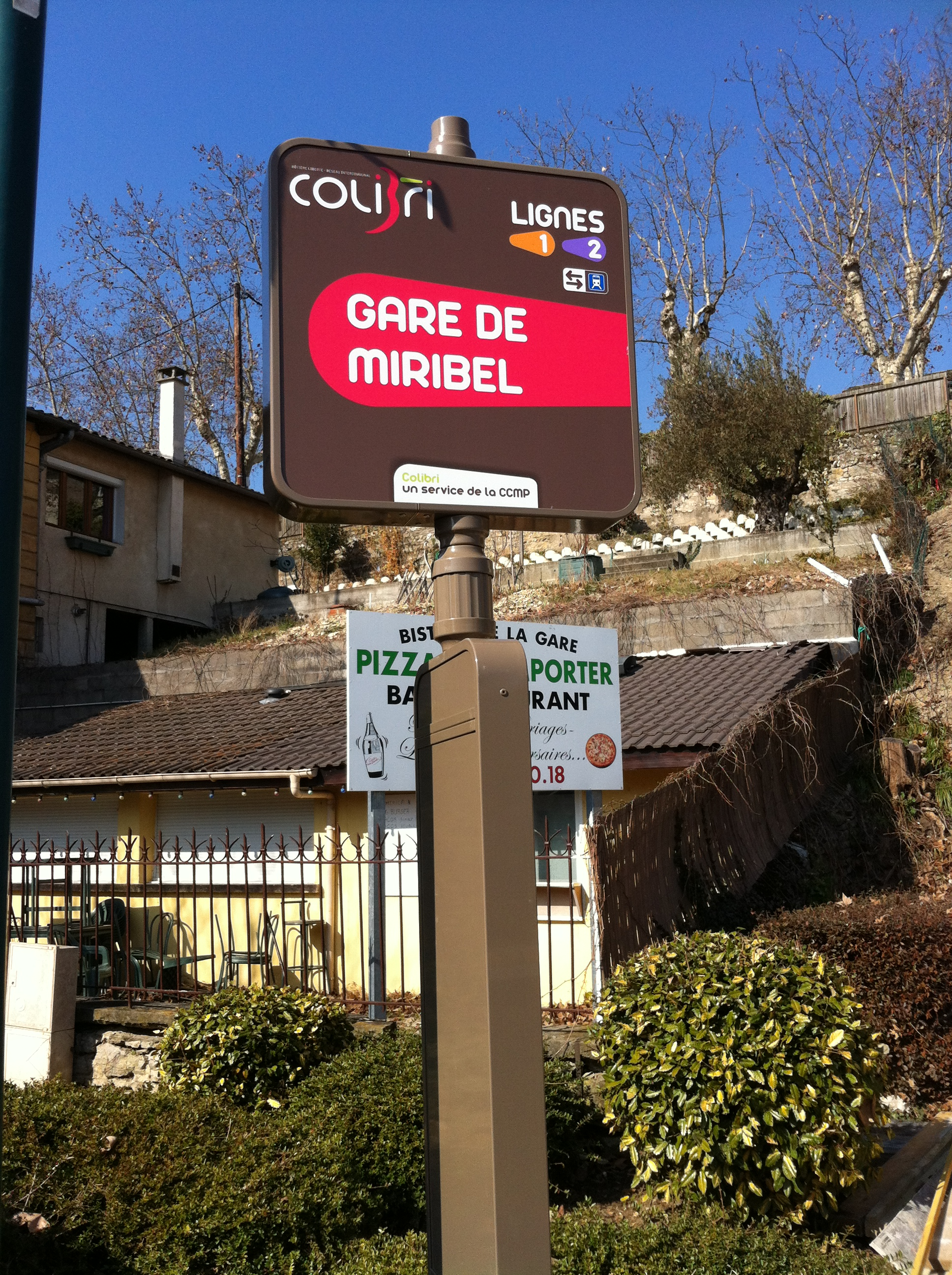 Gare de Miribel (arrêt des bus Colibri).